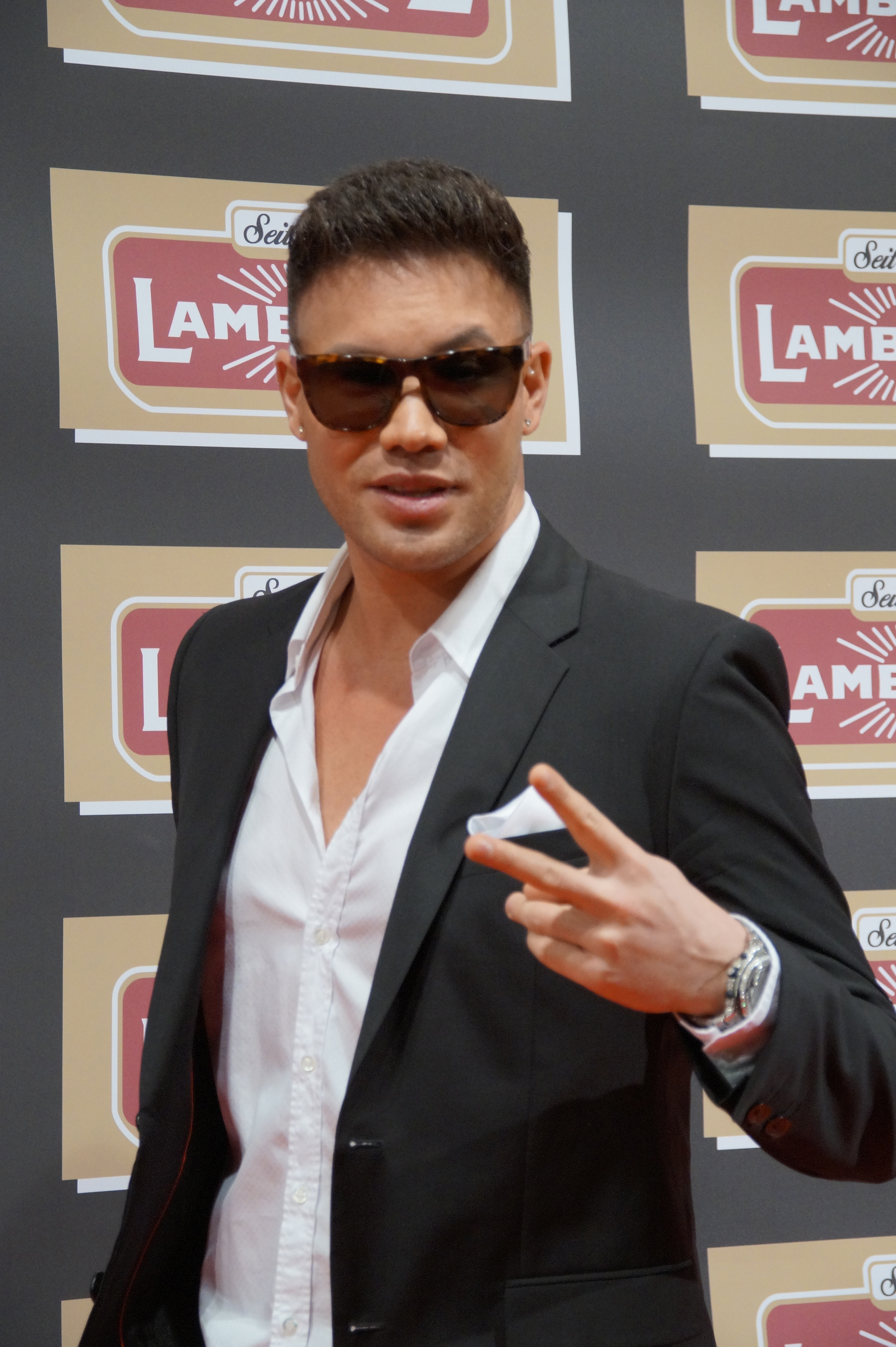 Kay One bei der Lambertz Monday Night, im Februar 2016.